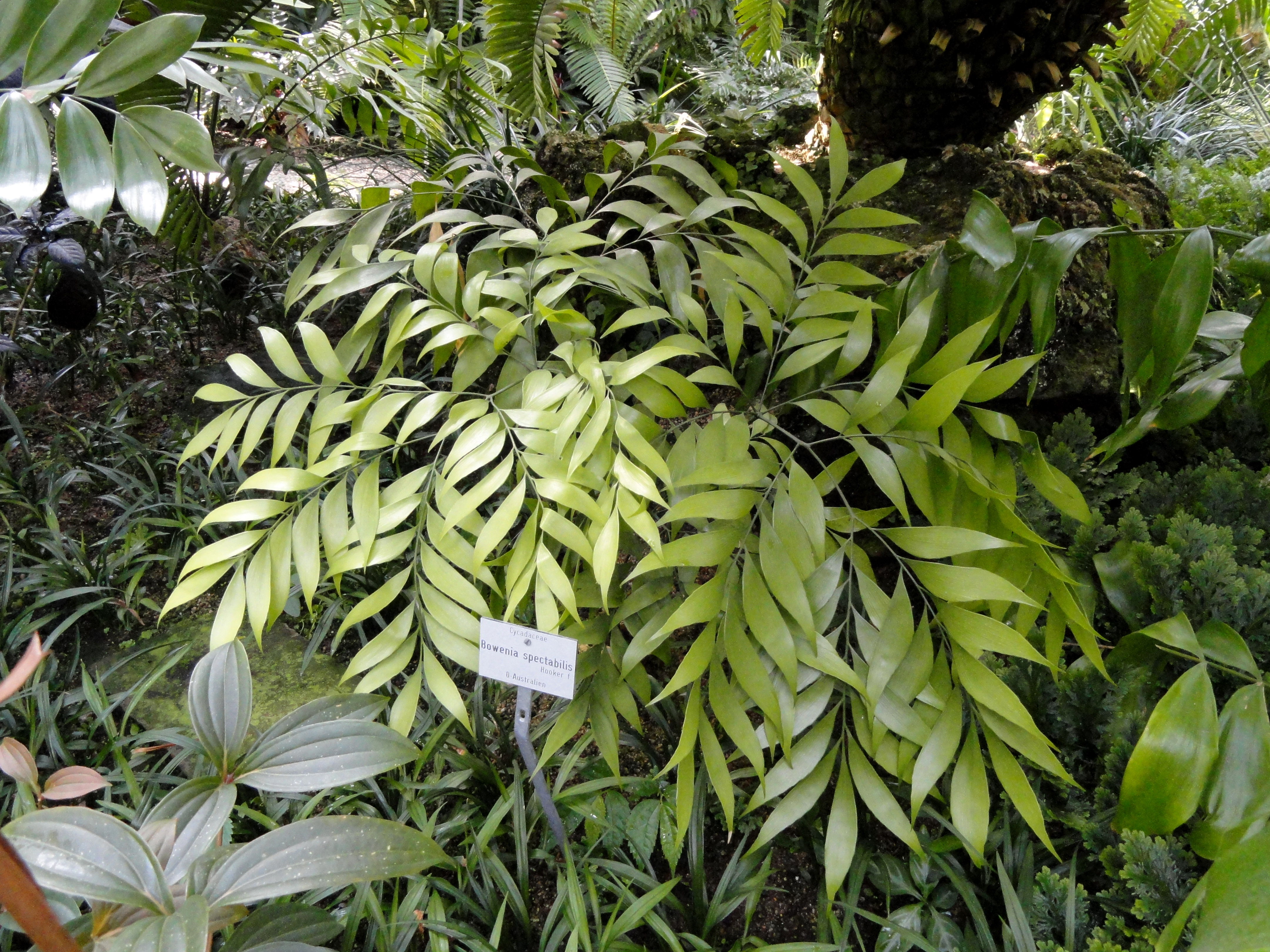 Bowenia spectabilis specimen in the Botanischer Garten München-Nymphenburg, Munich, Germany.